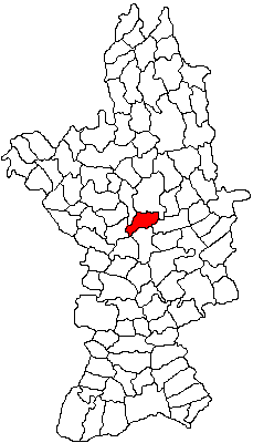 Categorie:Hărţi ale judeţului Olt